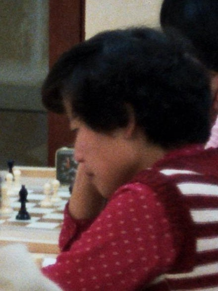 Miyoko Watai bei der Schacholympiade 1980 in Valletta auf Malta. Watai spielte am zweiten Brett des Kampfes Frankreich-Japan.